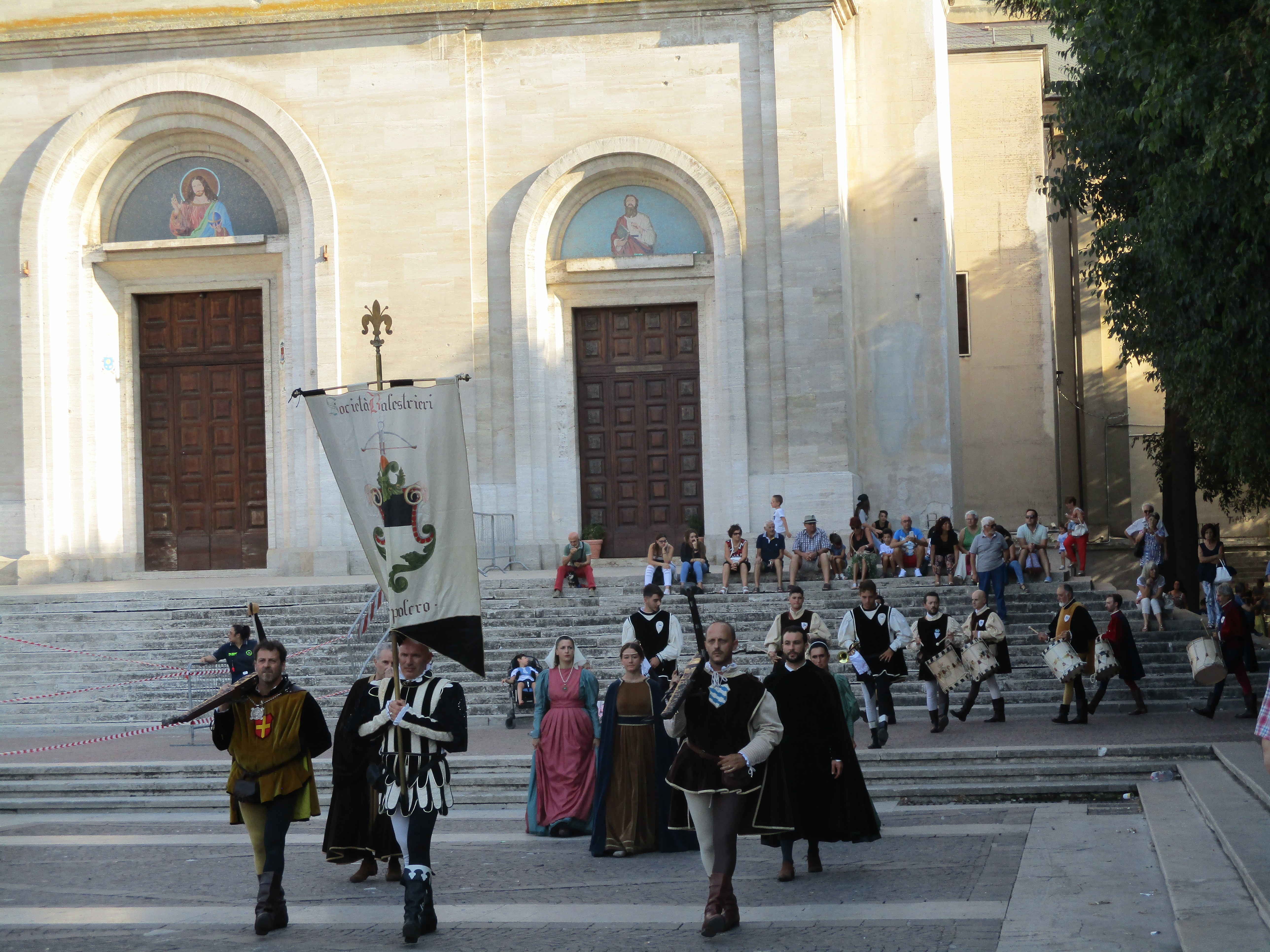 Balestrieri di Sansepolcro ad Avezzano